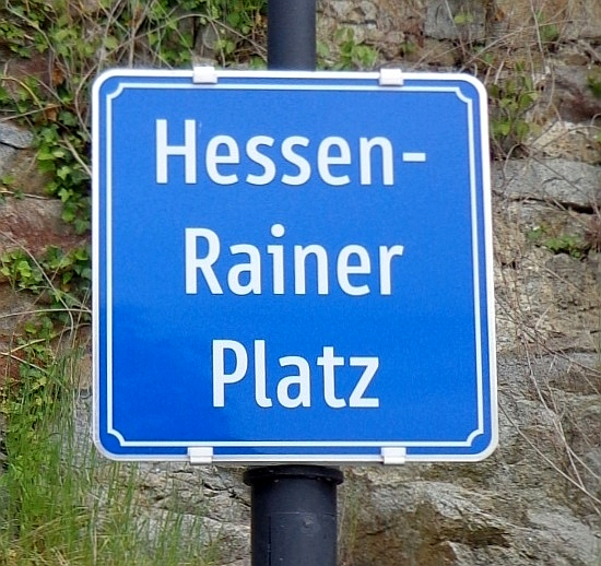 Schärding, Schlosspark - Hessen-Rainer-Platz zu Ehren der k.u.k. Infanterieregimenter „Hessen“ Nr. 14 und „Erzherzog Rainer“ Nr. 59.